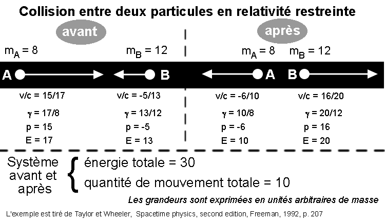 Collision entre deux particules.